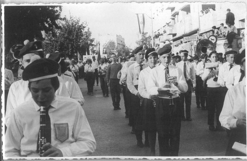 תזמורת הנוער של עיריית ירושלים, מצעד יום העצמאות 1964 היוצר התיר להשתמש בתמונה